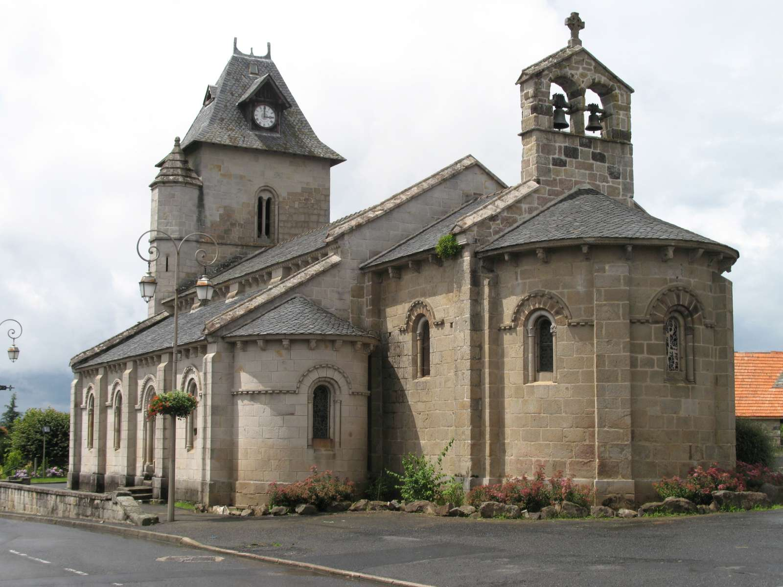 photo de l'église Saint-Martin de Champagnac dans le Cantal